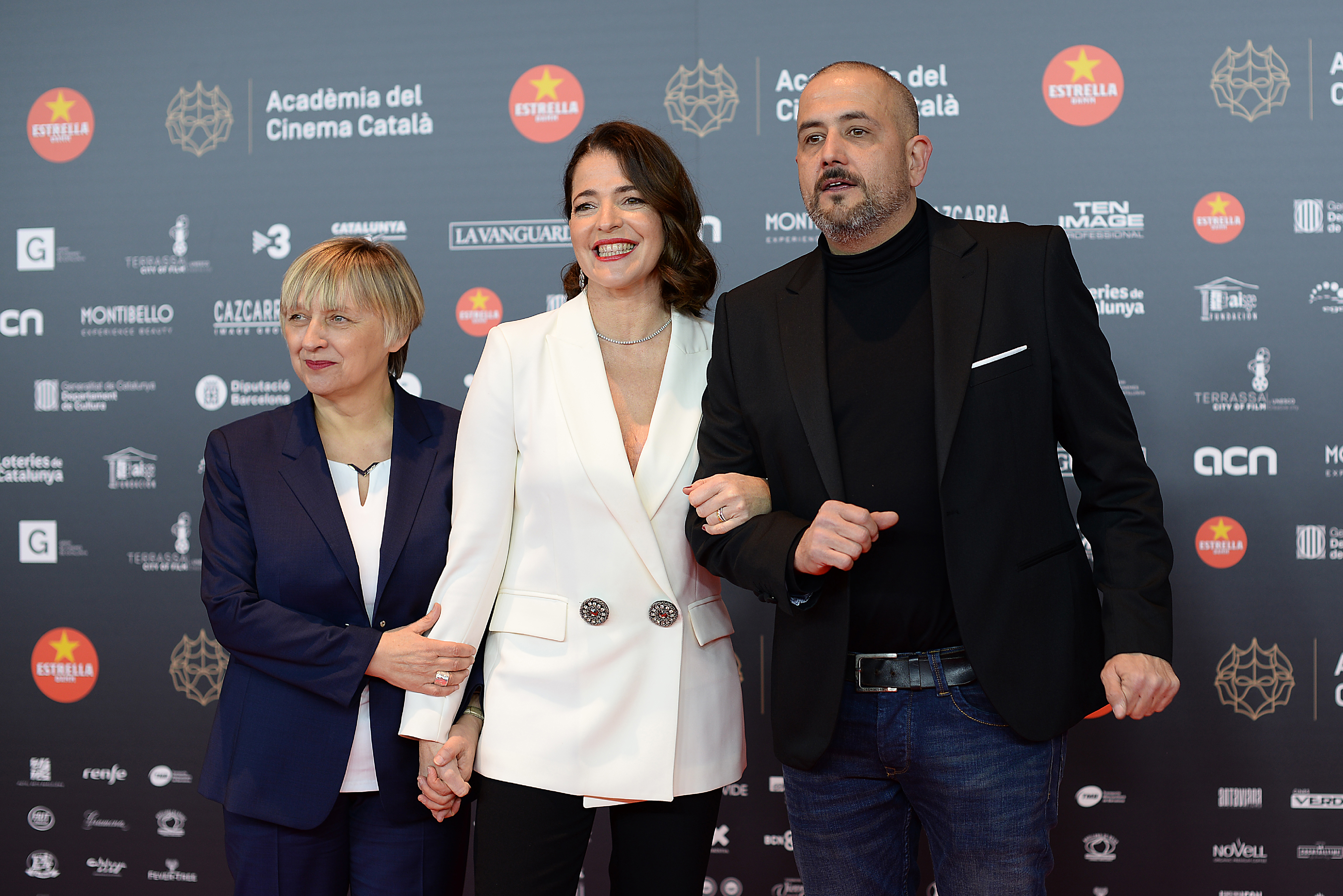 Teresa Font, muntantge; Nora Navas, actriu, i Marc Orts, so (Dolor y gloria), XII Premis Gaudí (2020)